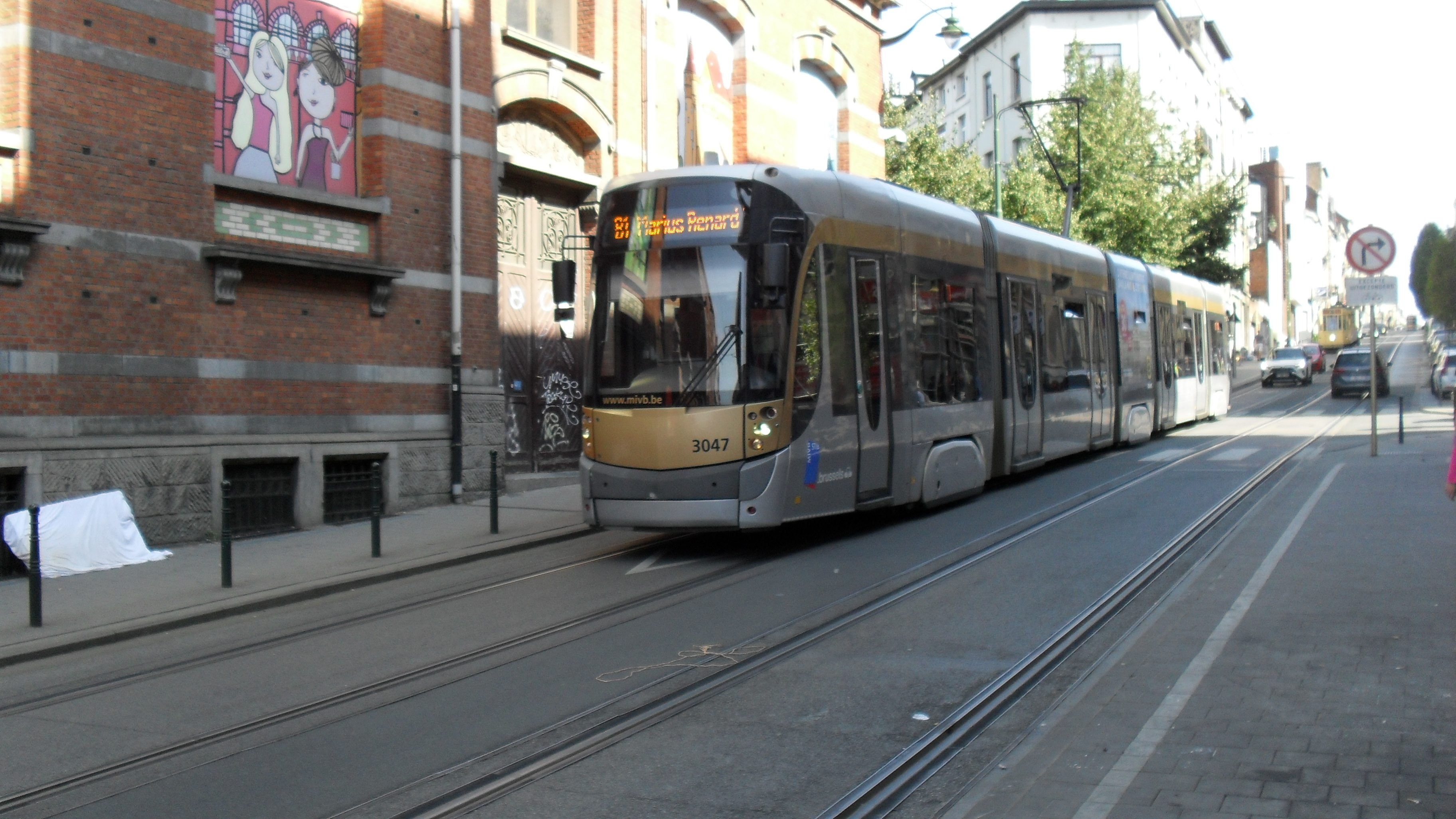 Tramway T3000 de la ligne 81 à Bethléem